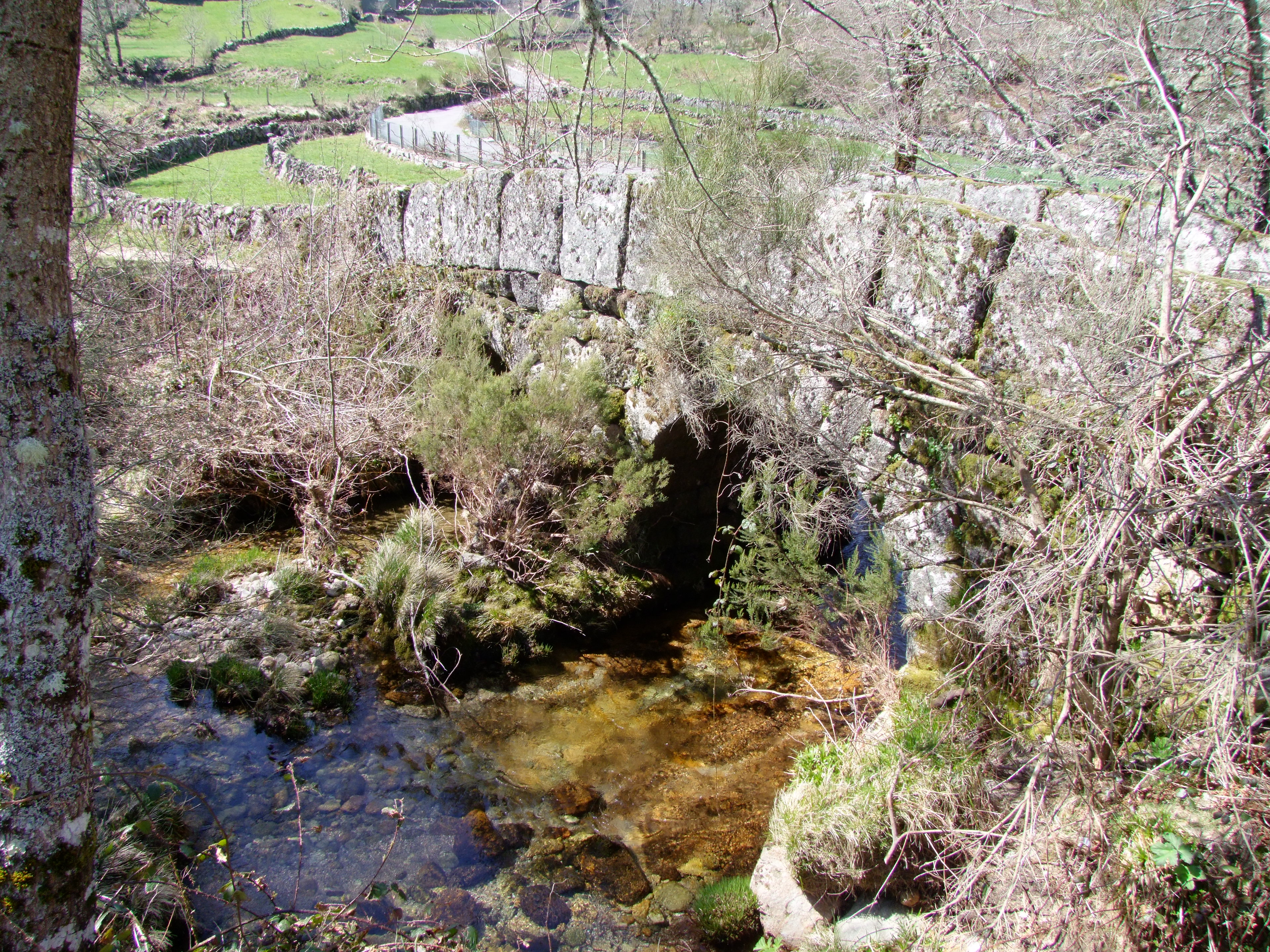 Ponte das Cainheiras. Portugal, Viana do Castelo, Melgaço, Castro Laboreiro, lugar das Cainheiras.